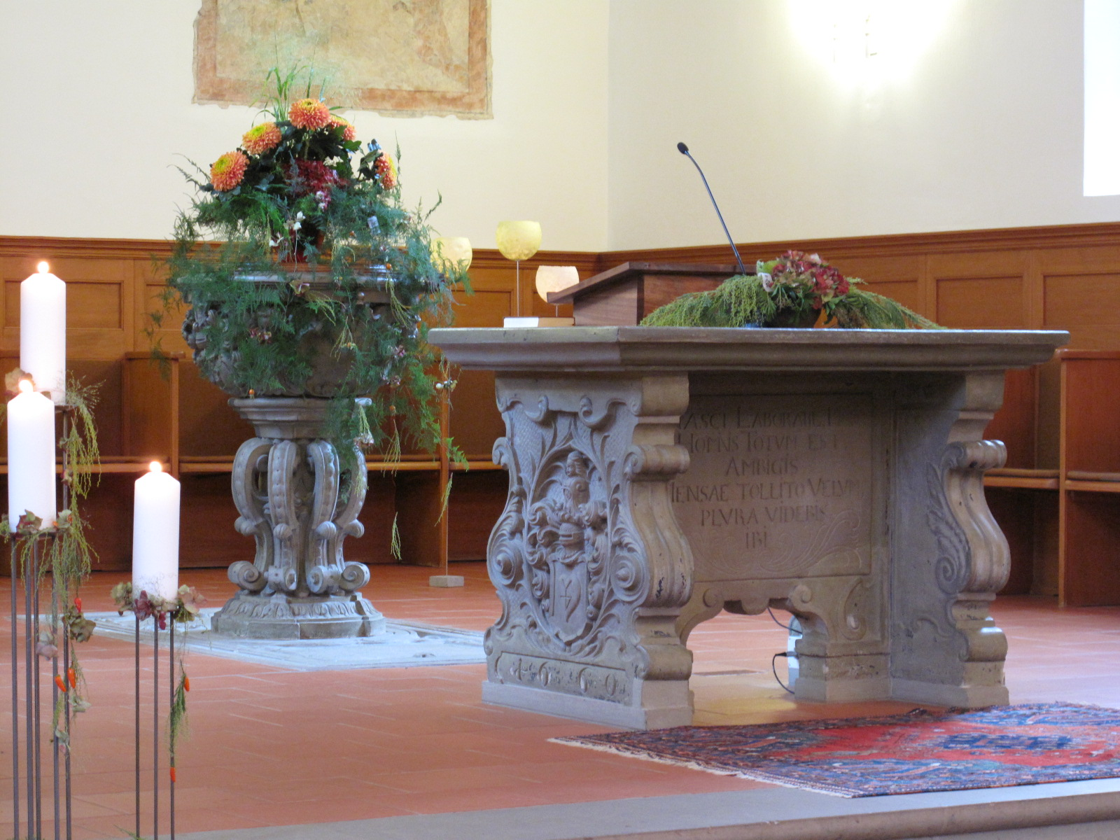 Taufstein und Abendmahlstisch im Altarraum der Kirche Wangen an der Aare.